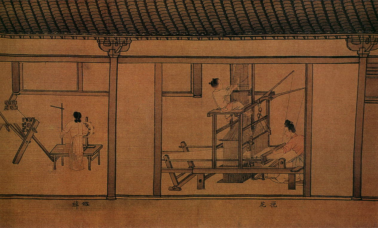 中文（香港）: 蠶織圖局部